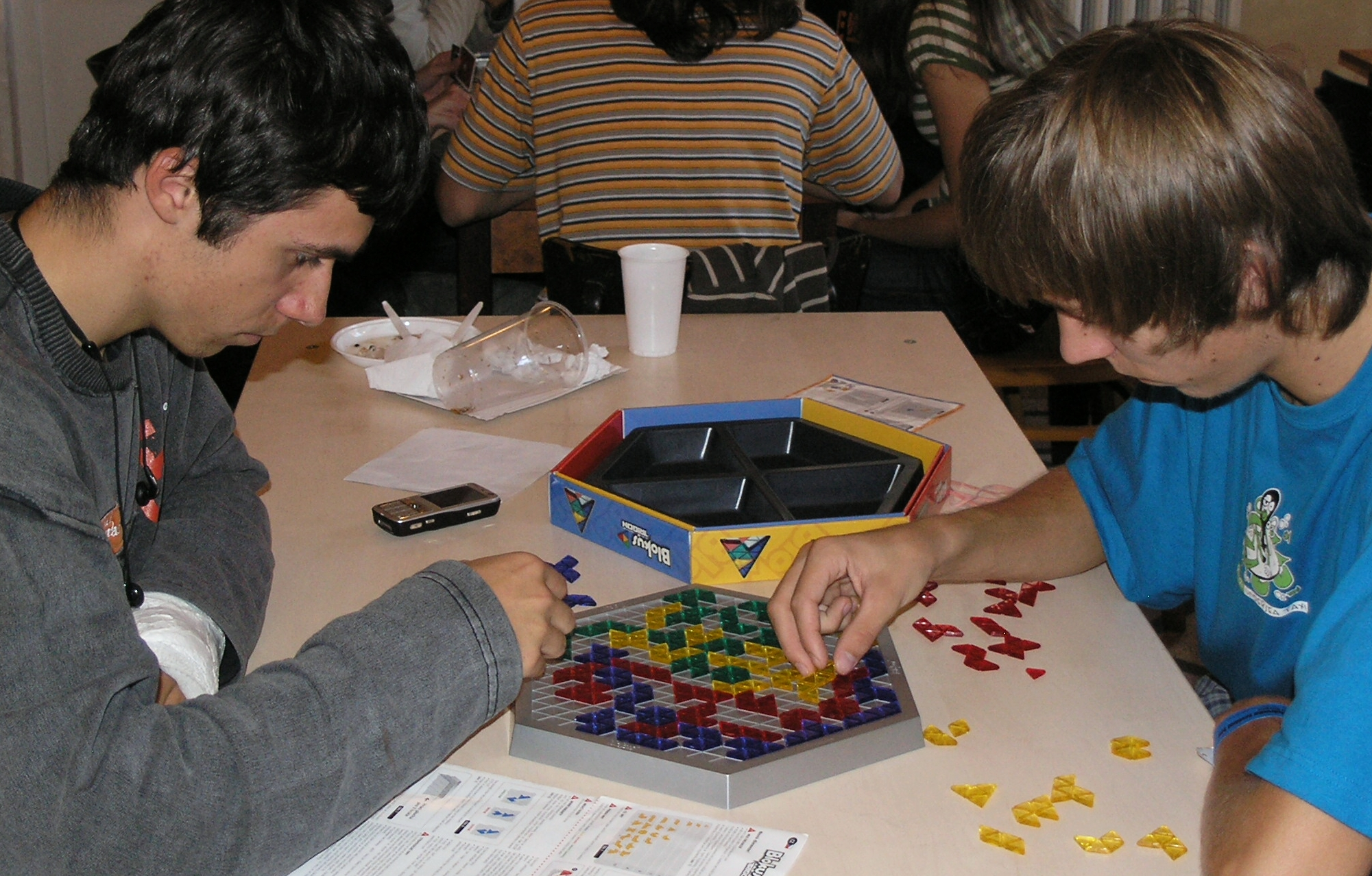 Deskohraní 2008